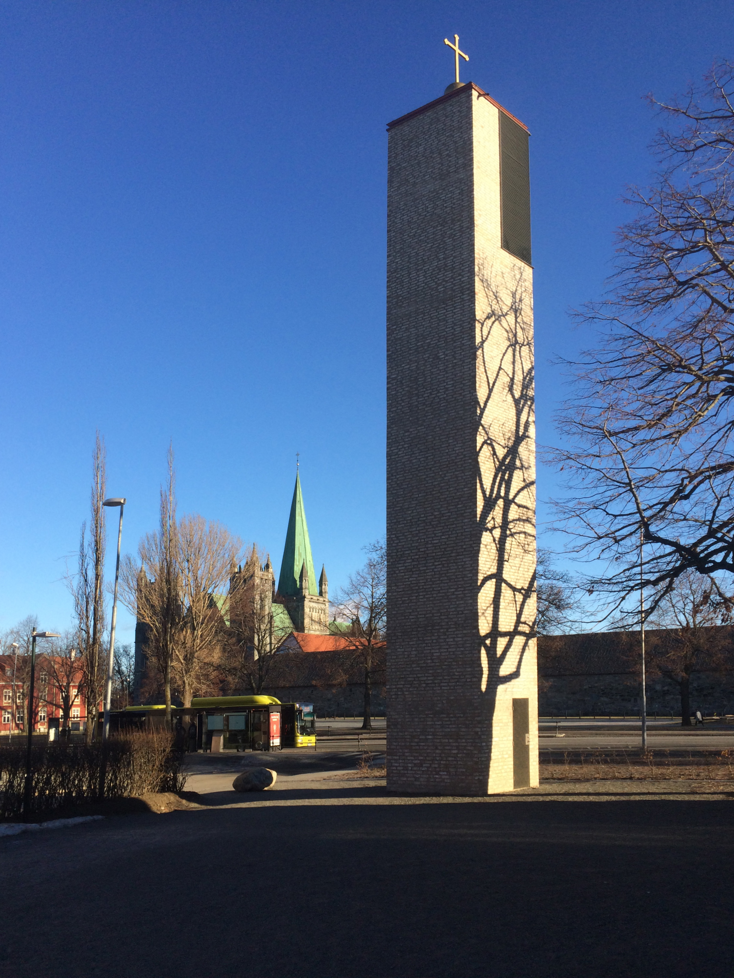 Nye St. Olav domkirkes klokketårn (kampanile) fra vest. Nidarosdomen i bakgrunnen